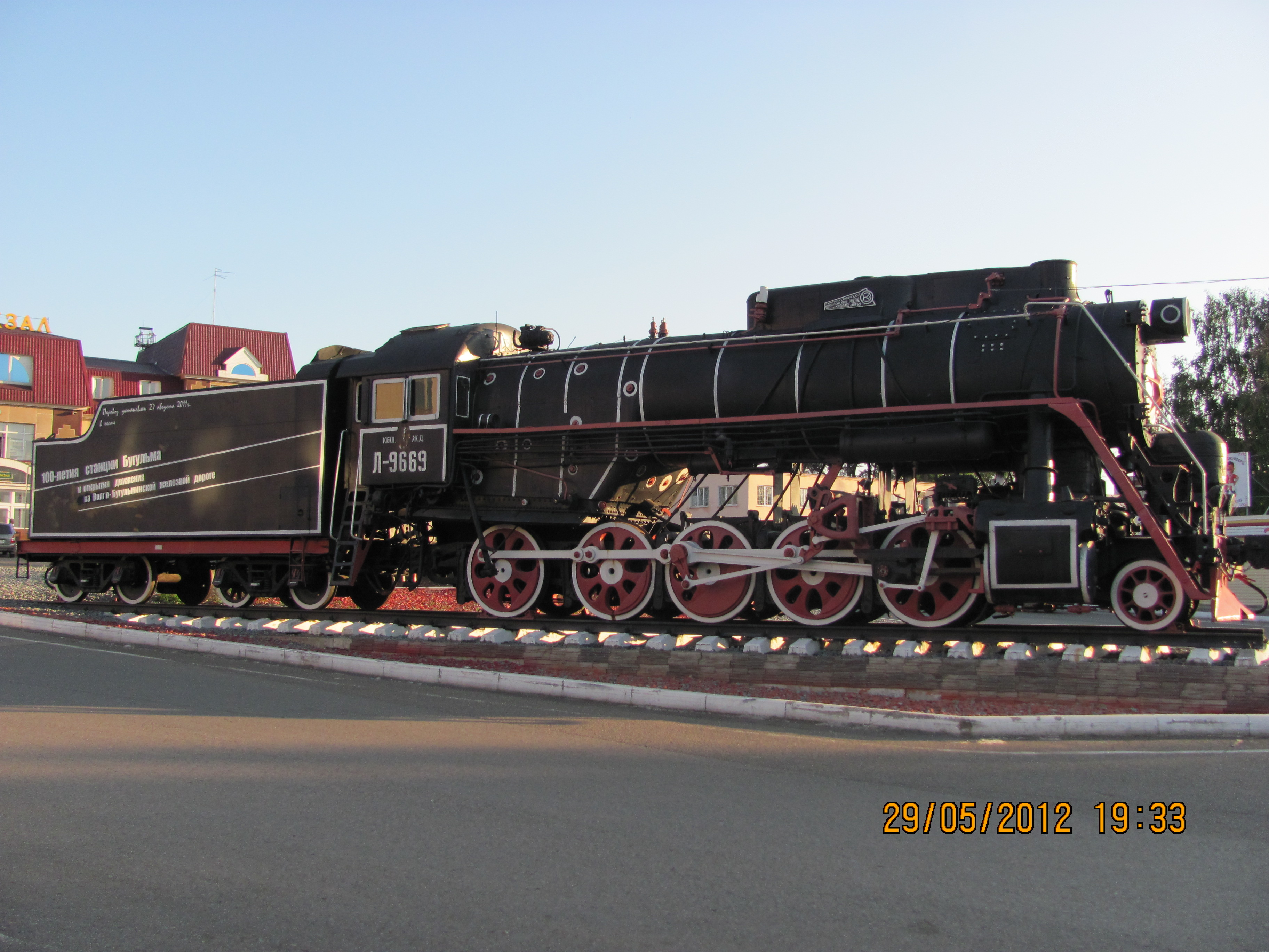 Памятник-паровоз Л-1765 (№9669)